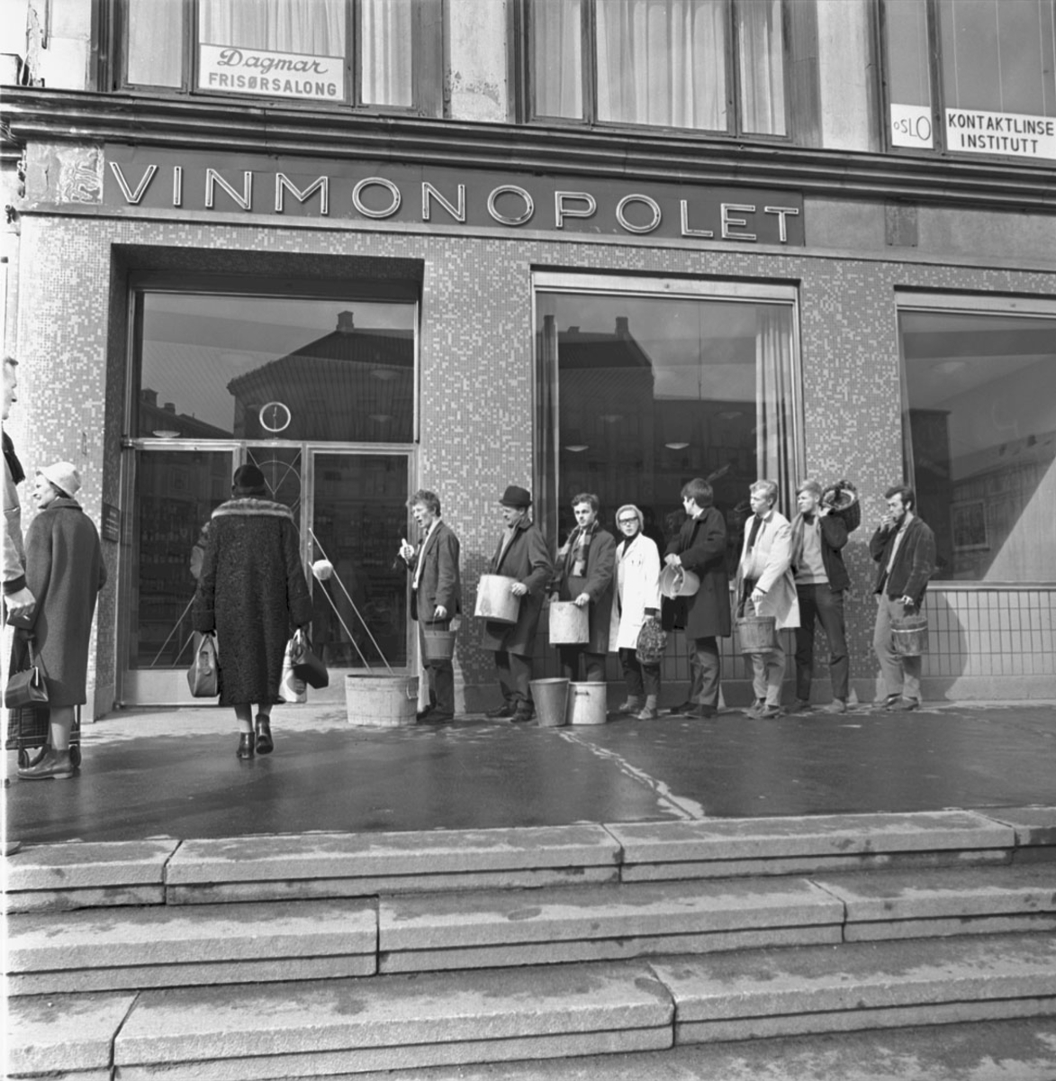 Kø av kunder med bøtter og vinballonger utenfor Vinmonopolutsalg på Majorstuen 1. april